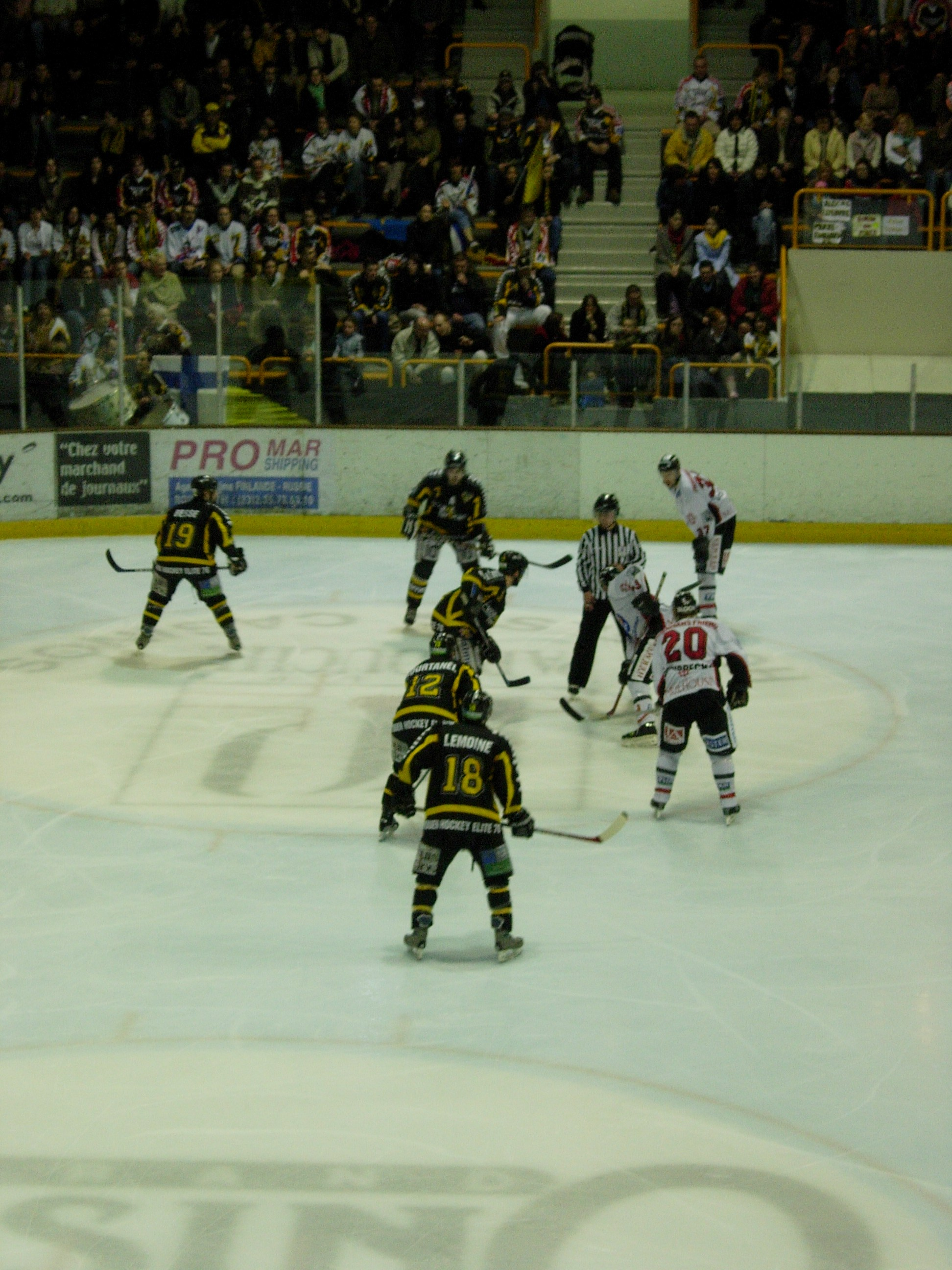 Demi-finale de la Ligue Magnus 2004-05, Rouen affronte Mulhouse à l'Ile Lacroix